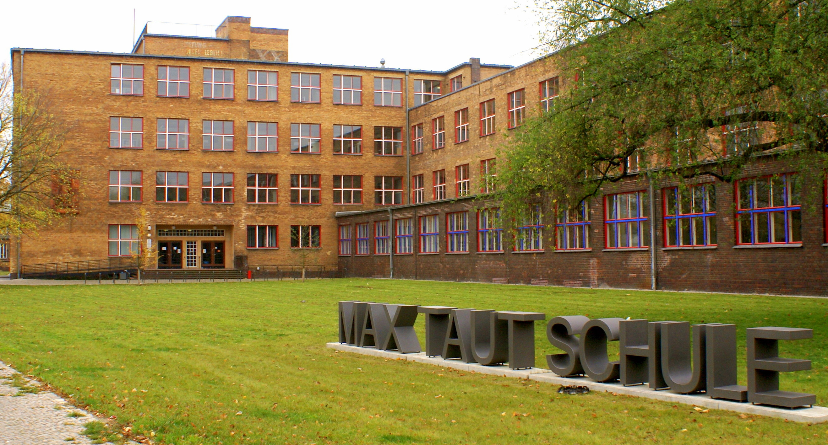 Max Taut Schule in Berlin Lichtenberg